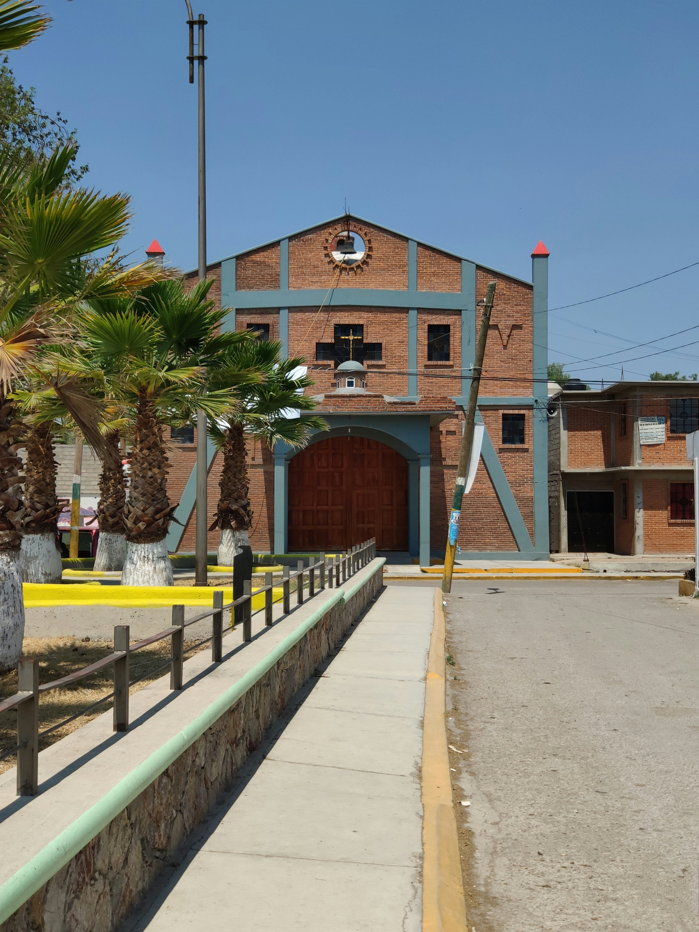 La iglesia de San Judas Tadeo ubicada en la comunidad de El Tablón, Atitalaquia, Hidalgo México. Es uno de los centros ceremoniales de la iglesia católica que sirven como punto de referencía entre los habitantes.